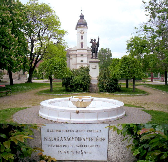 Petőfi emléktábla a dunavecsei első világháborús emlékmű talapzatán (Bács-Kiskun megye, Magyarország)